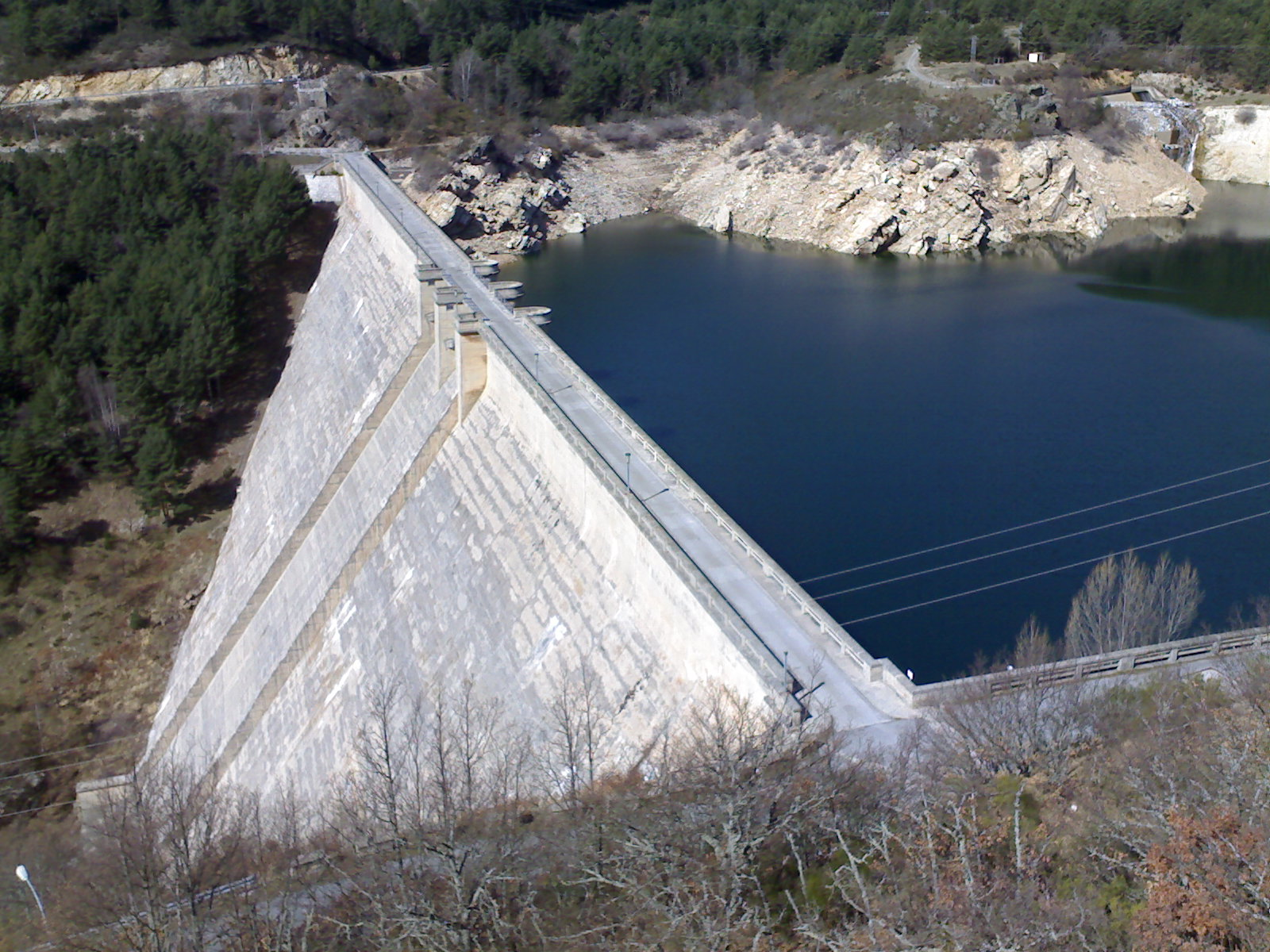 Pantano de Compuerto